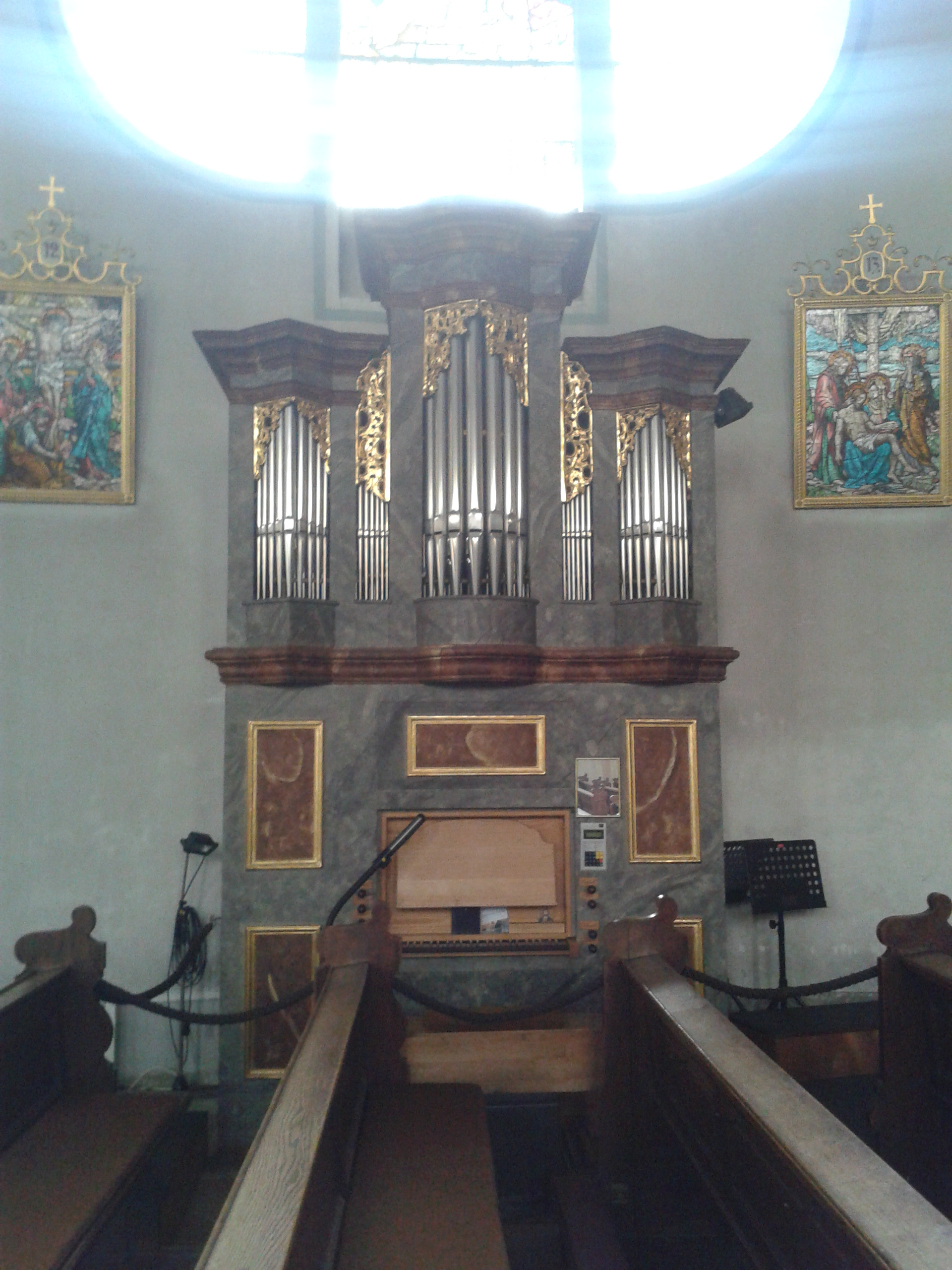 Stadtpfarrkirche St. Josef (Reinhausen): Barockorgel (nördl. Querhaus)